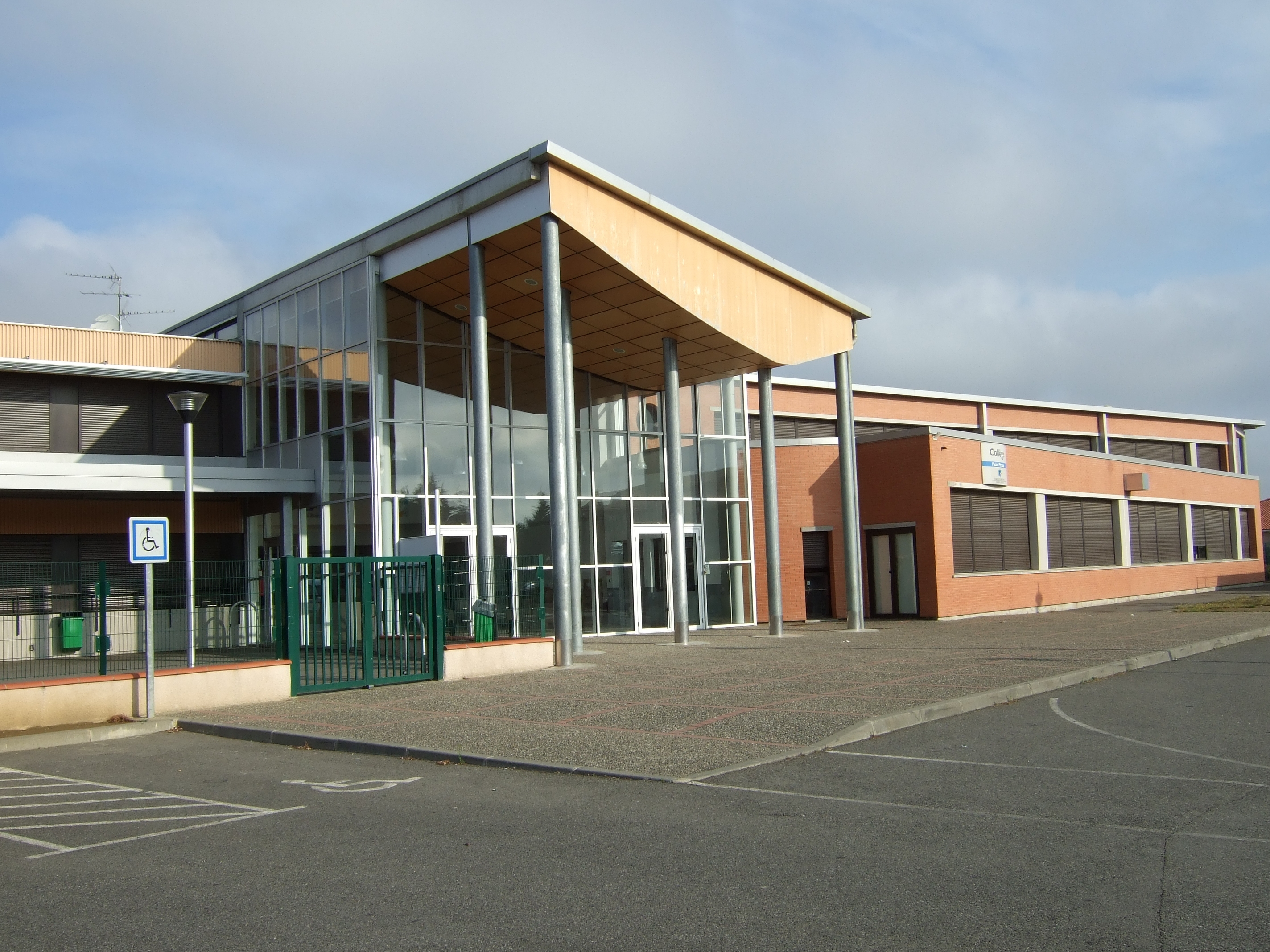 Collège Pablo Picasso de Frouzins (Haute-Garonne, France).